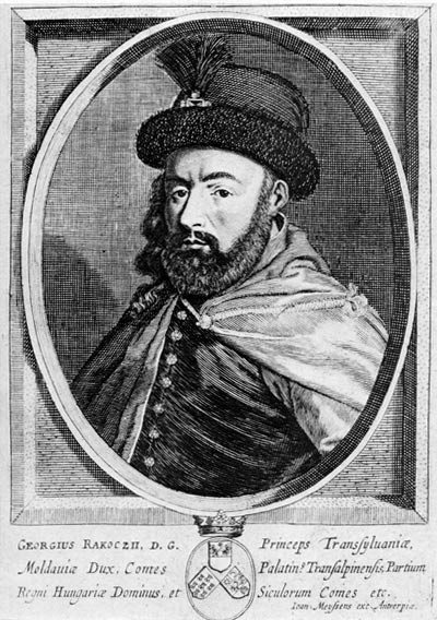 II. Rákóczi György